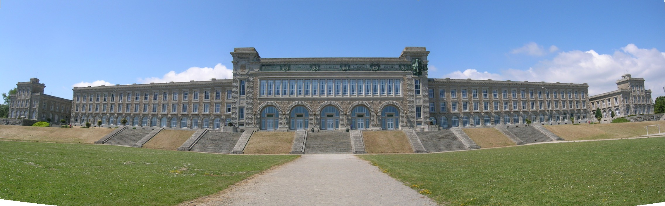 Vue panoramique du Lycée_naval à Brest.